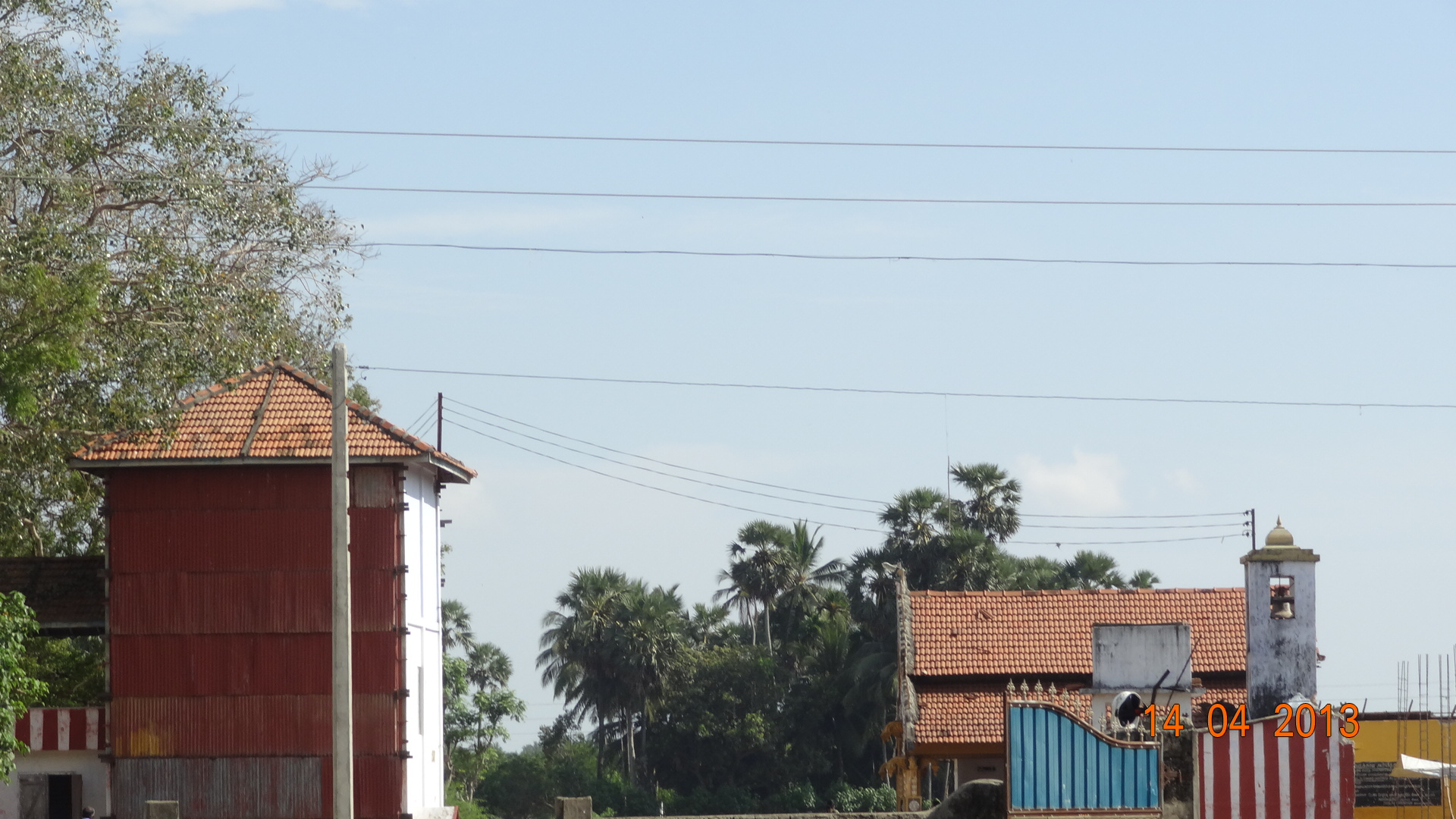 அளவெட்டி வெளிவயல் முத்துமாரி அம்மன் ஆலயம்